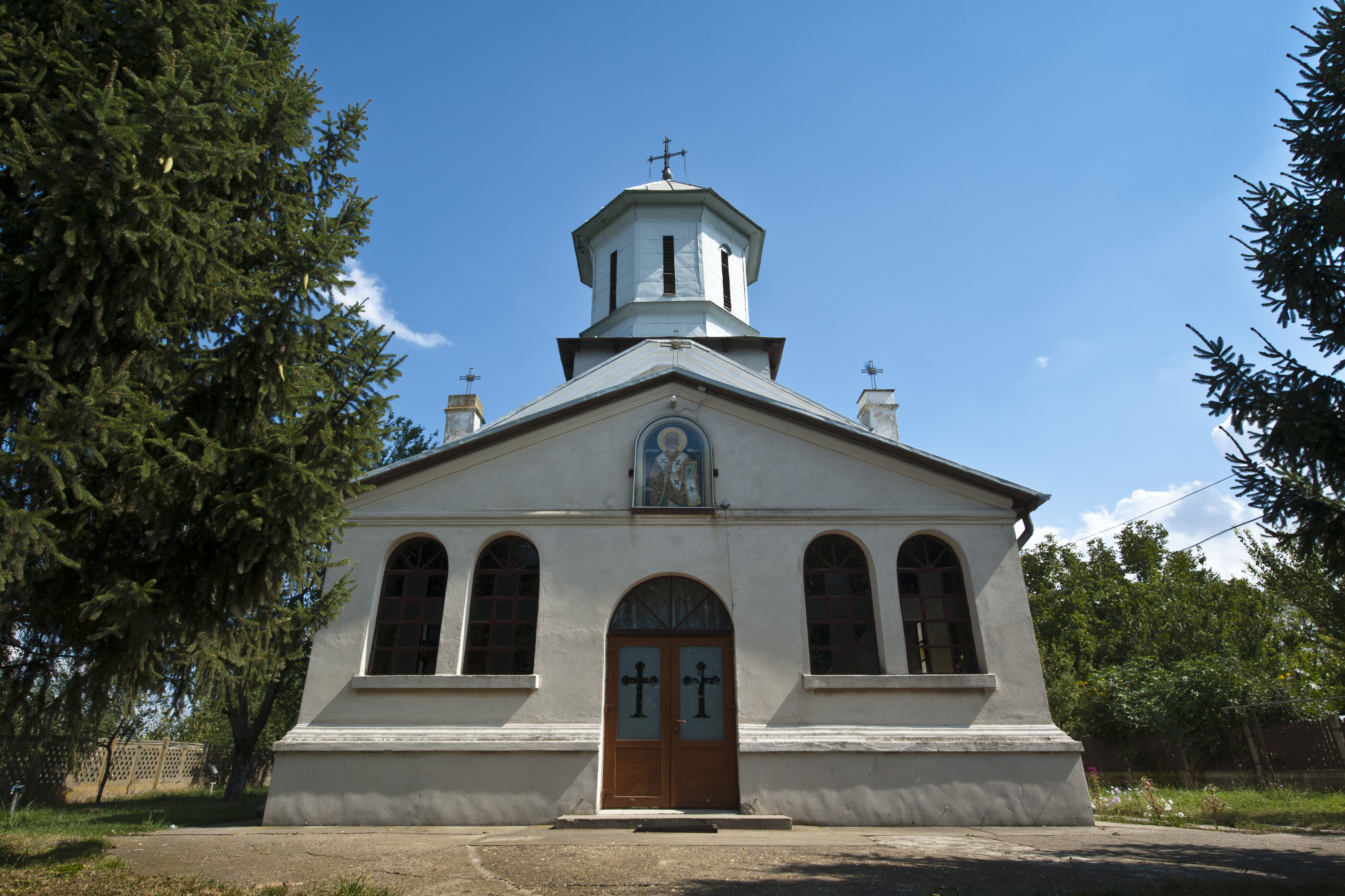 Biserica „Sf. Ierarh Nicolae”